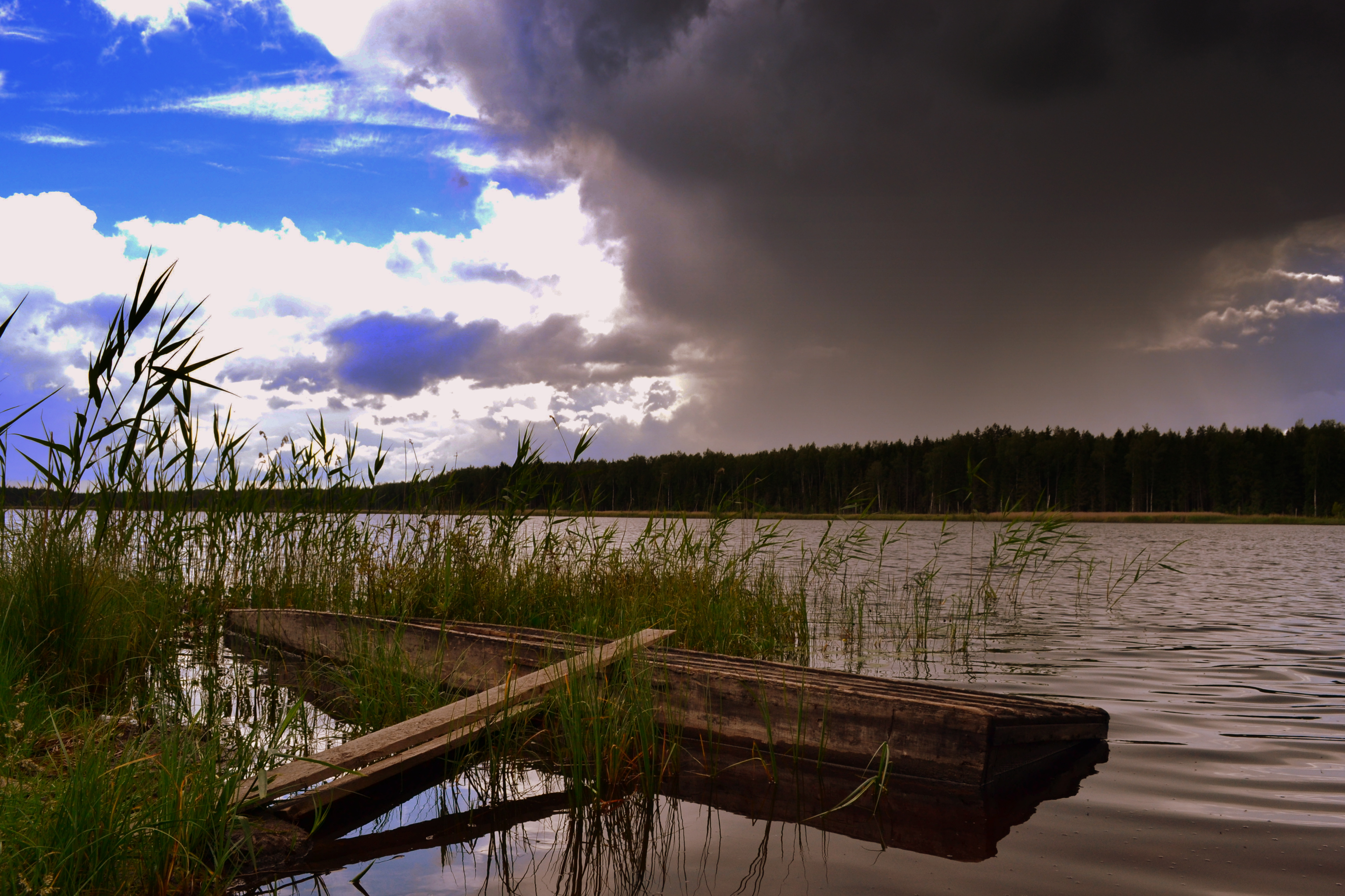 Ubajärv (ka Ubahaava järv, Pikkjärv) asub Võrumaal Mõniste vallas Koemetsa külas.